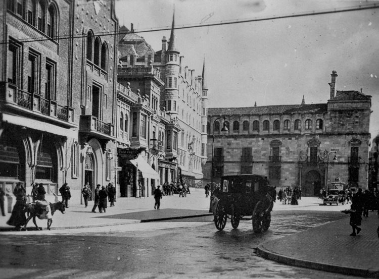 Calle de San Marcelo - León - Fotografía 85 x 70 B/N